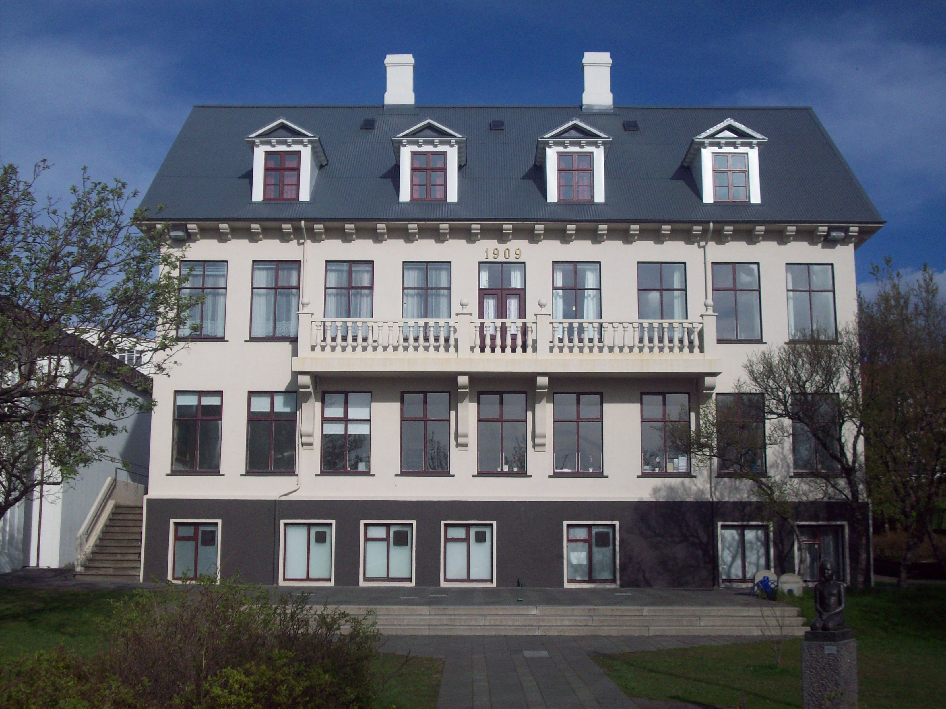 Kvennaskólinn í Reykjavík. Arkitekt: Röngnvaldur Ólafsson (d. 1917)